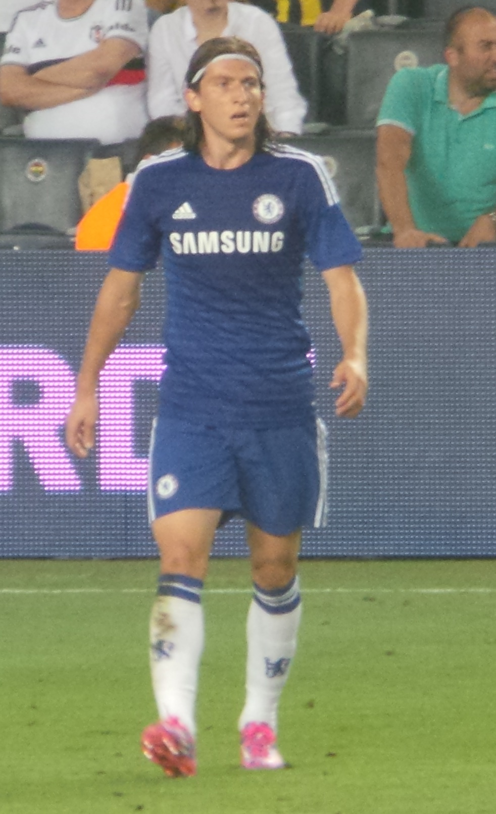 Filipe Luis SOMA turnuvası